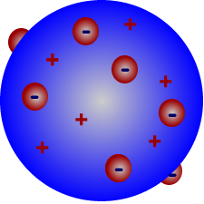 Modelo atómico de Thomson.